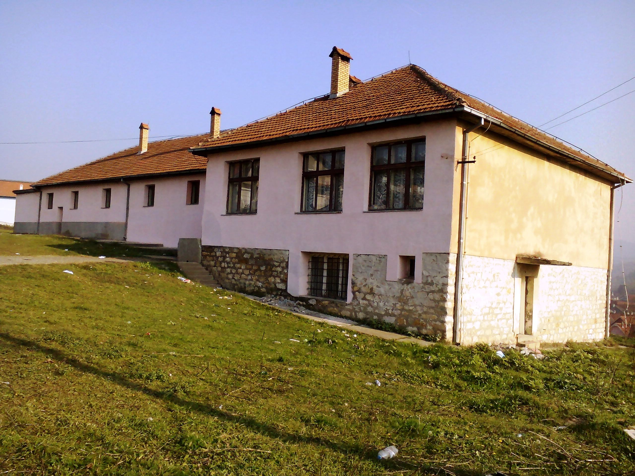 Школска зграда